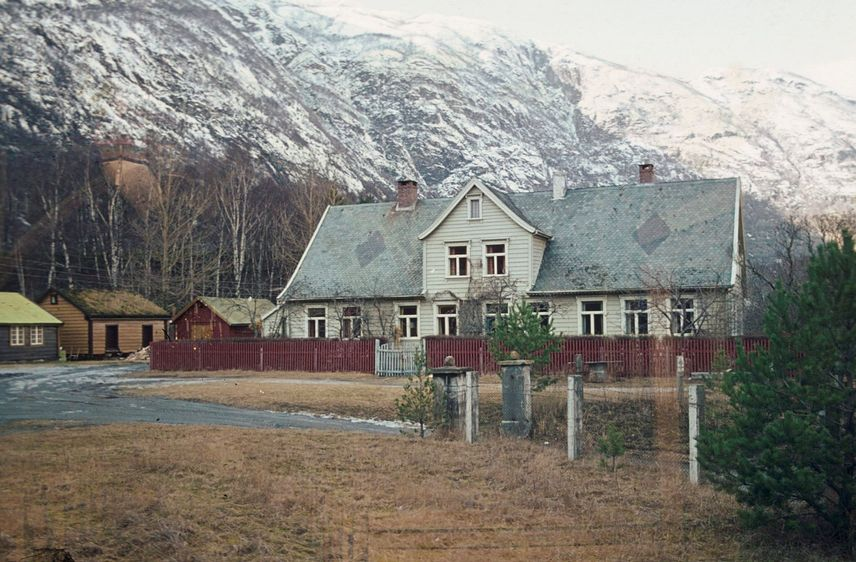 Lærdal prestegård, Tønjum. Foto: Ina Backer. Fra Riksantikvarens Kulturminnesøk.